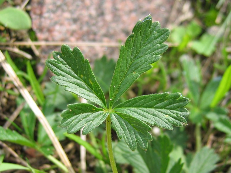 Wismarer Hügelfingerkraut Potentilla wismariensis, Wismarbucht